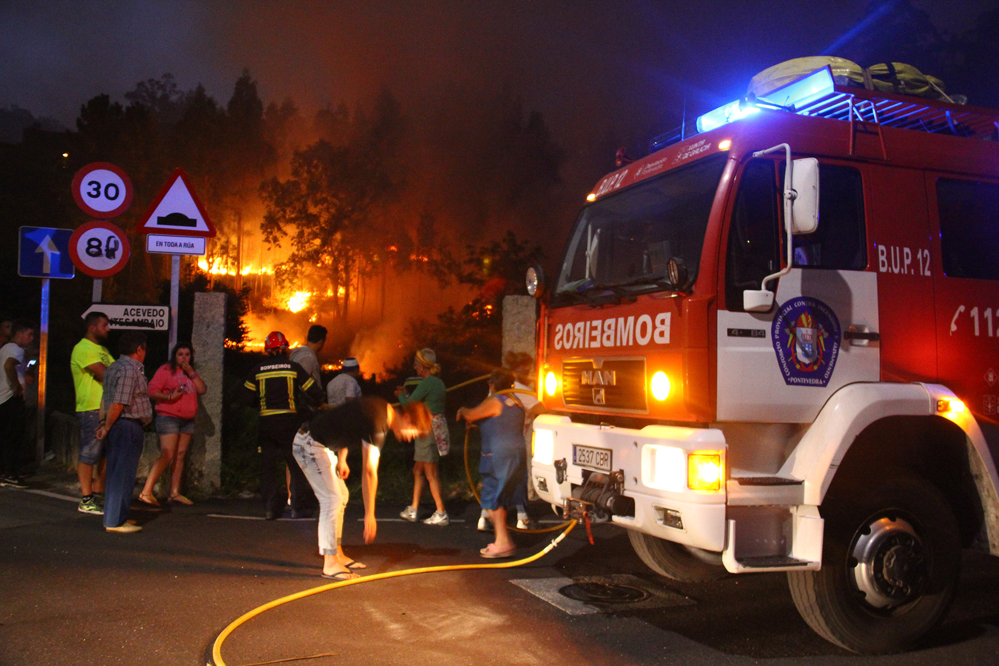 Incendio forestal en la parroquia de Puente Sampayo, Pontevedra (Galicia, España), el 10 de agosto de 2016. Forest Fire in the parish of Puente Sampayo, Pontevedra (Galicia, Spain), on 10 August 2016.